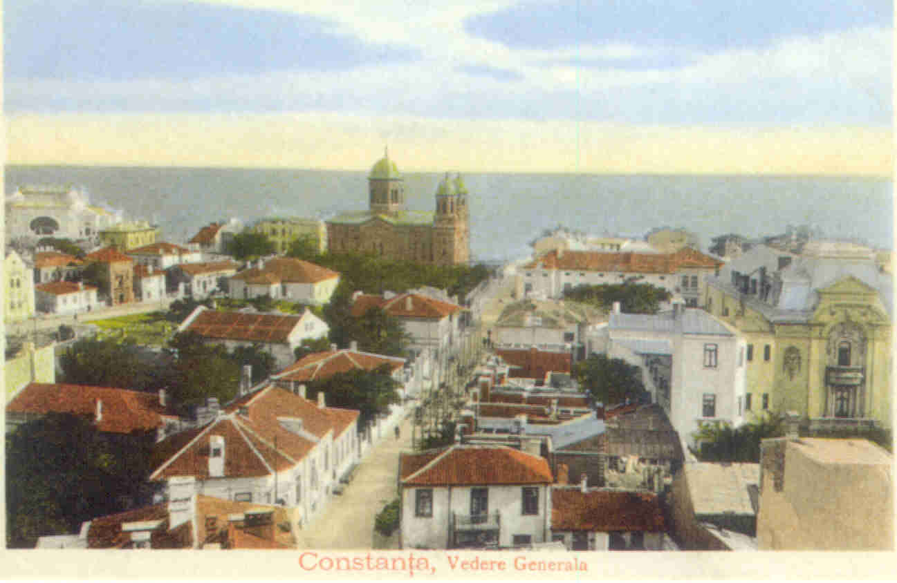 Vedere generala spre est (1909), din minaretul Moscheei; in dreapta se vede Casa cu Lei, iar in ultimul plan se pot distinge Catedrala (in centru) si Cazinoul Comunal (in stanga).